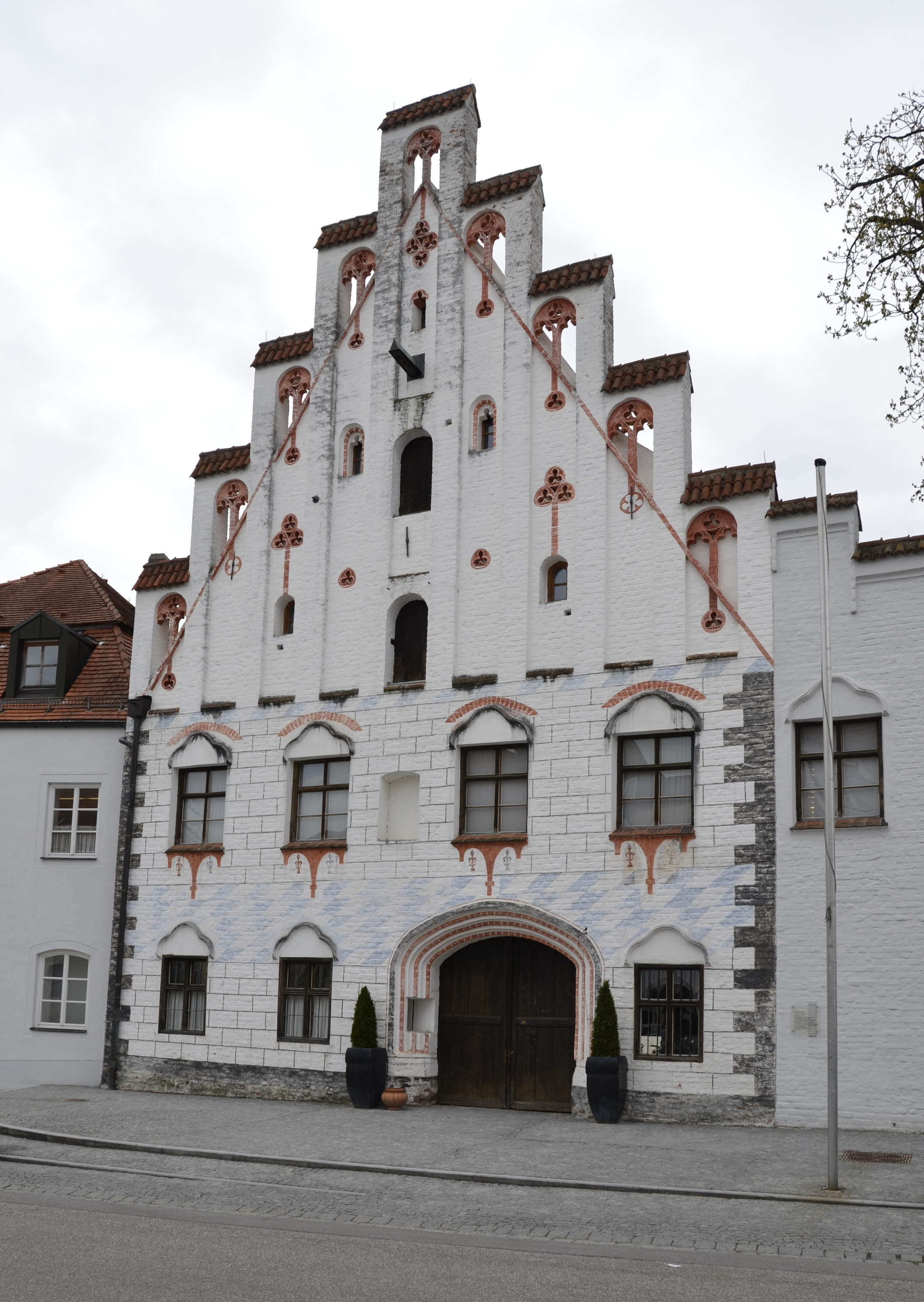 Die Hauptfassade der Herzogsburg in Dingolfing.